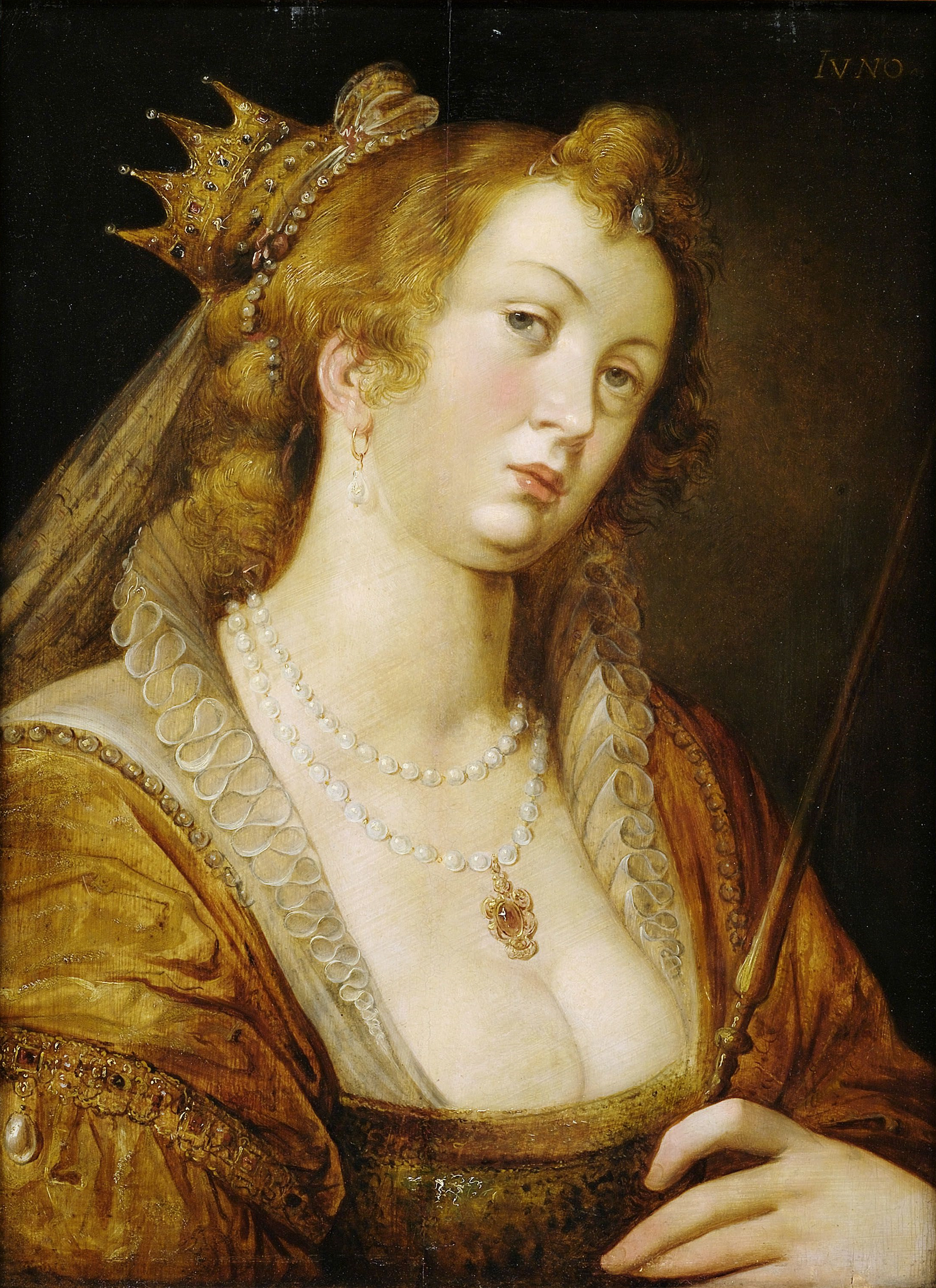 Juno (möglicherweise Teil eine Göttinnen-Zyklus). Öl auf Holz, oben rechts bezeichnet, 66 x 50 cm